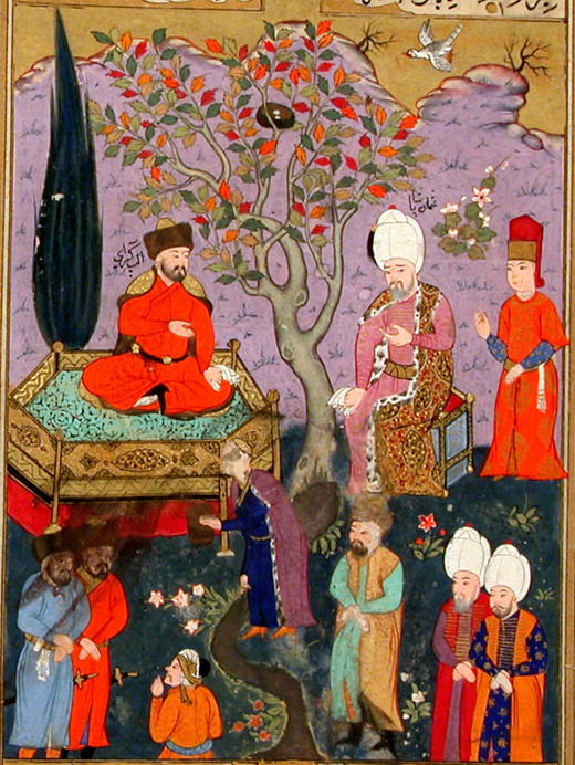 Secaatname 0211